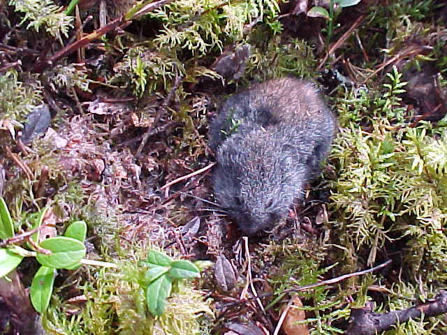 Kuvan metsäsopuli Myopus schisticolor kuvattu Pyhä-Häkin kansallispuistossa 5.8.2003